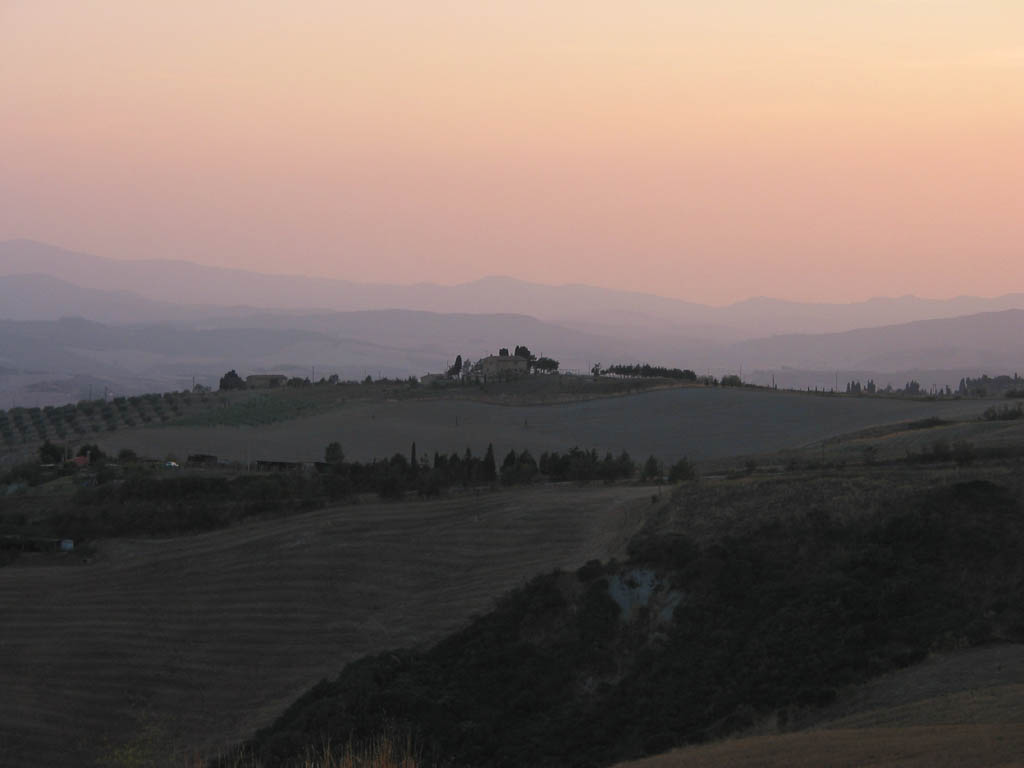 landscape near Volterra